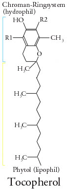 Tocopherol; selbst erstellt; gemeinfrei Kategorie:Bild:Strukturformel